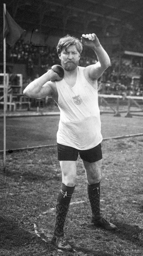 Tison [vice-champion de France USFSA du lancer du poids, 16-6-12 à Colombes] : [photographie de presse] / [Agence Rol]